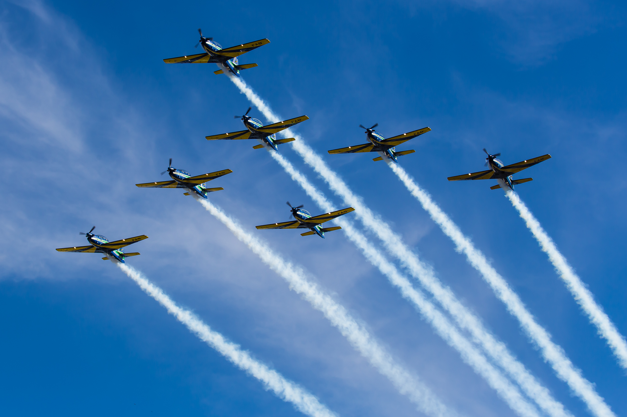 Kartódromo Arena Schincariol, Itu/SP